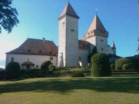 Château de La Sarraz, VD, Suisse